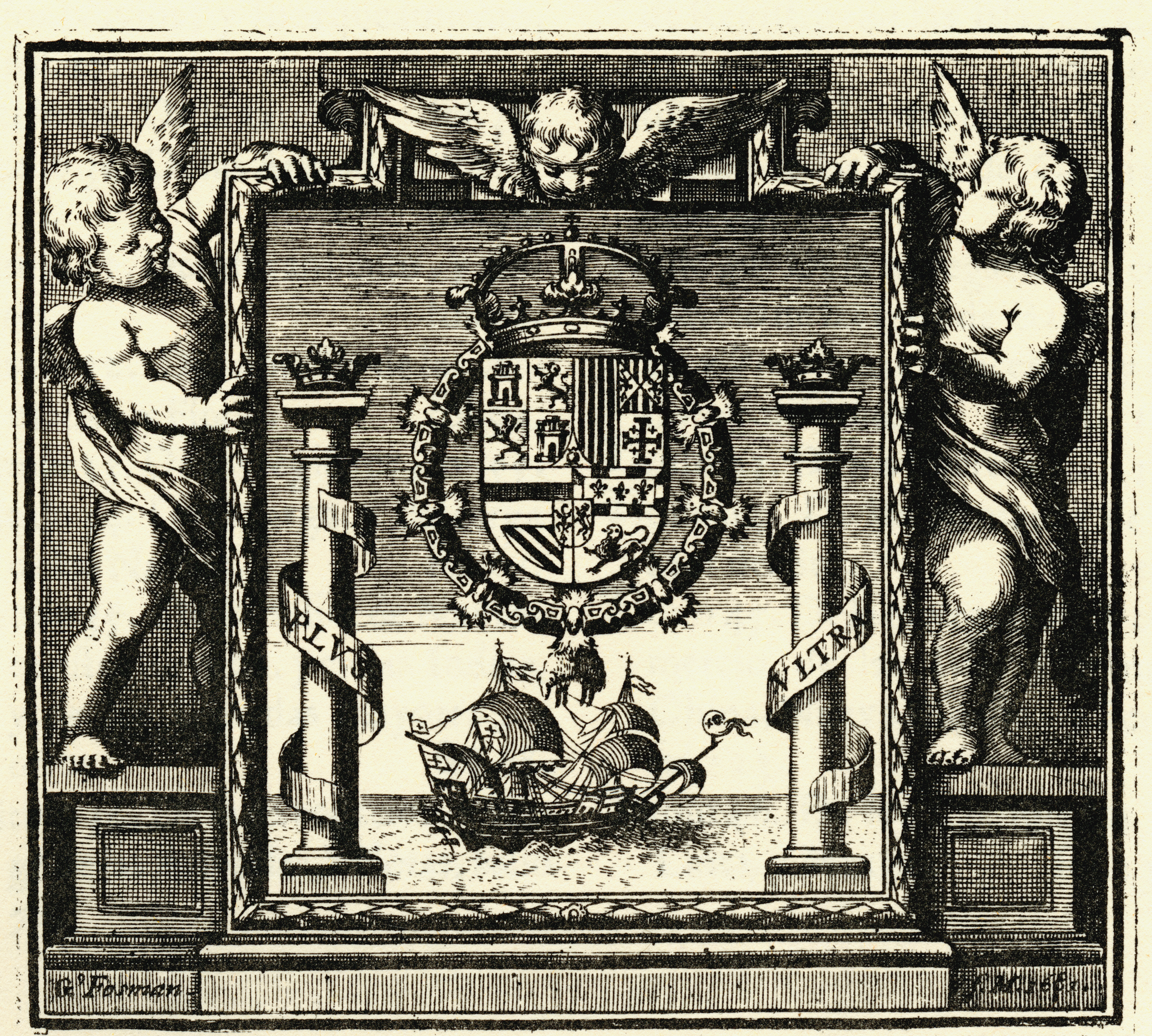 Grabado que ilustra el detalle alegórico a los territorios de las Indias, compuesto en su interior por un fondo que emulan aguas marinas en relativo al concepto de Imperio Ultramarino, se ubican encimadas las columnas de Hércules con el lema PLVS – VLTRA, que rodean el escudo de la rama hispana de los Habsburgo y una carabela puesta en altamar memorando el descubrimiento del continente americano que fue denominado oficialmente como Indias y Nuevo Mundo en otras titulaciones; todo aquello encerrado en un marco cuadrangular con incrustaciones morfologicas de hojas de olivo y/o laurel. El marco está decorado por la presencia de tres querubines comunes en la ornamentación barroca. La imagen fue concebida a motivo de la portada que yace diseñada para la obra Recopilación de Leyes de las Indias, publicada el año de 1681 reinando Don Carlos Segundo de Habsburgo. Diapositiva de escáner para consulta y acceso público extraída del ejemplar custodiado en la sección de Fondos Bibliográficos (Sección de Cabildos Coloniales) del Archivo Histórico del Guayas - Guayaquil, Ecuador. Consultado y compartido por el usuario Jodison Javier García Alcivar.